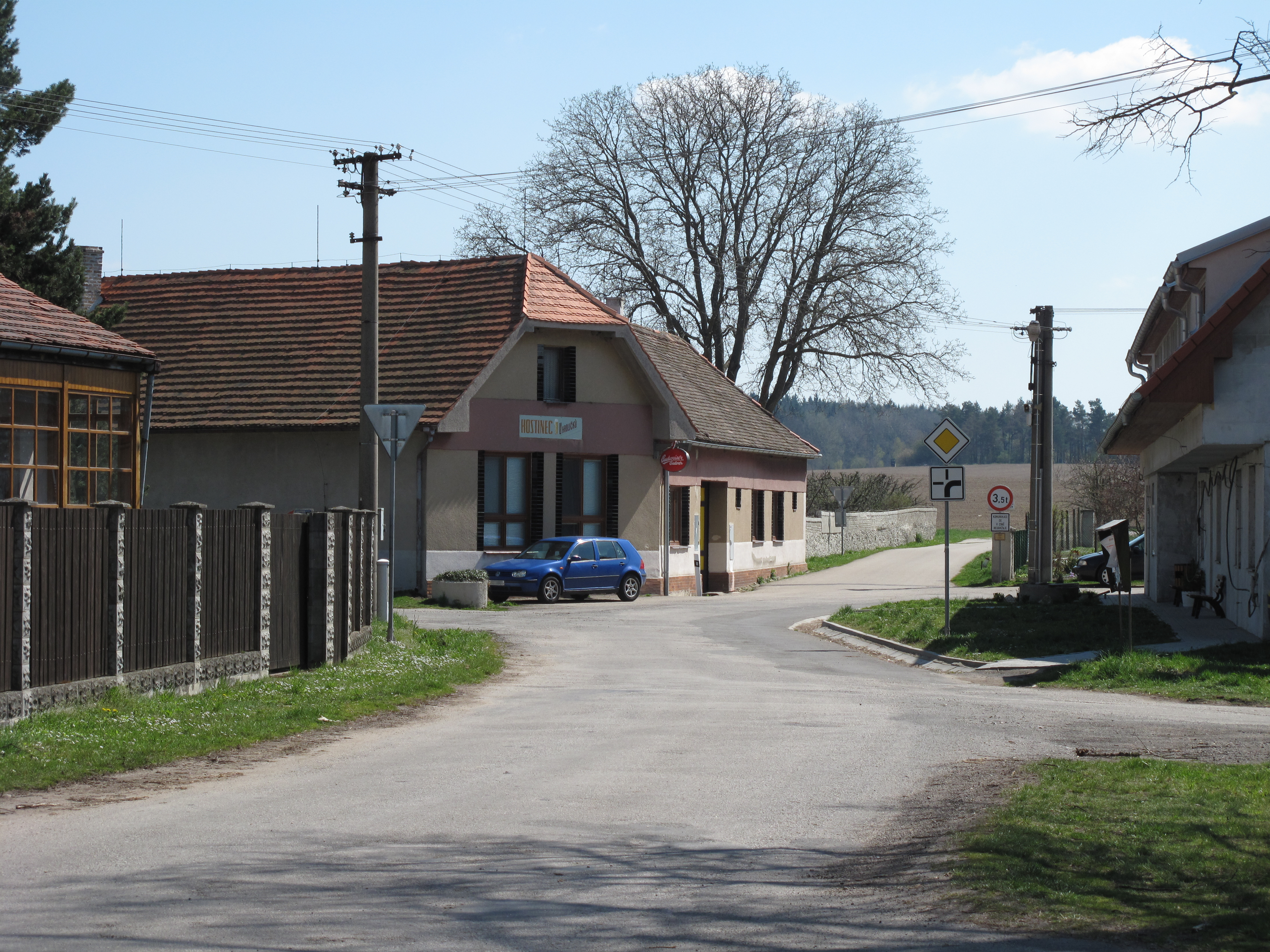 Hospoda v Modré Hůrce. Okres České Budějovice, Česká republika.